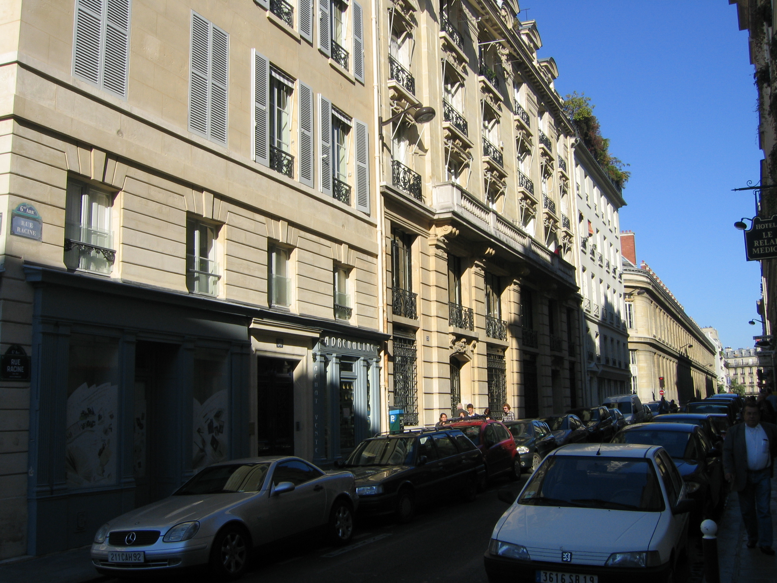 Rue Racine